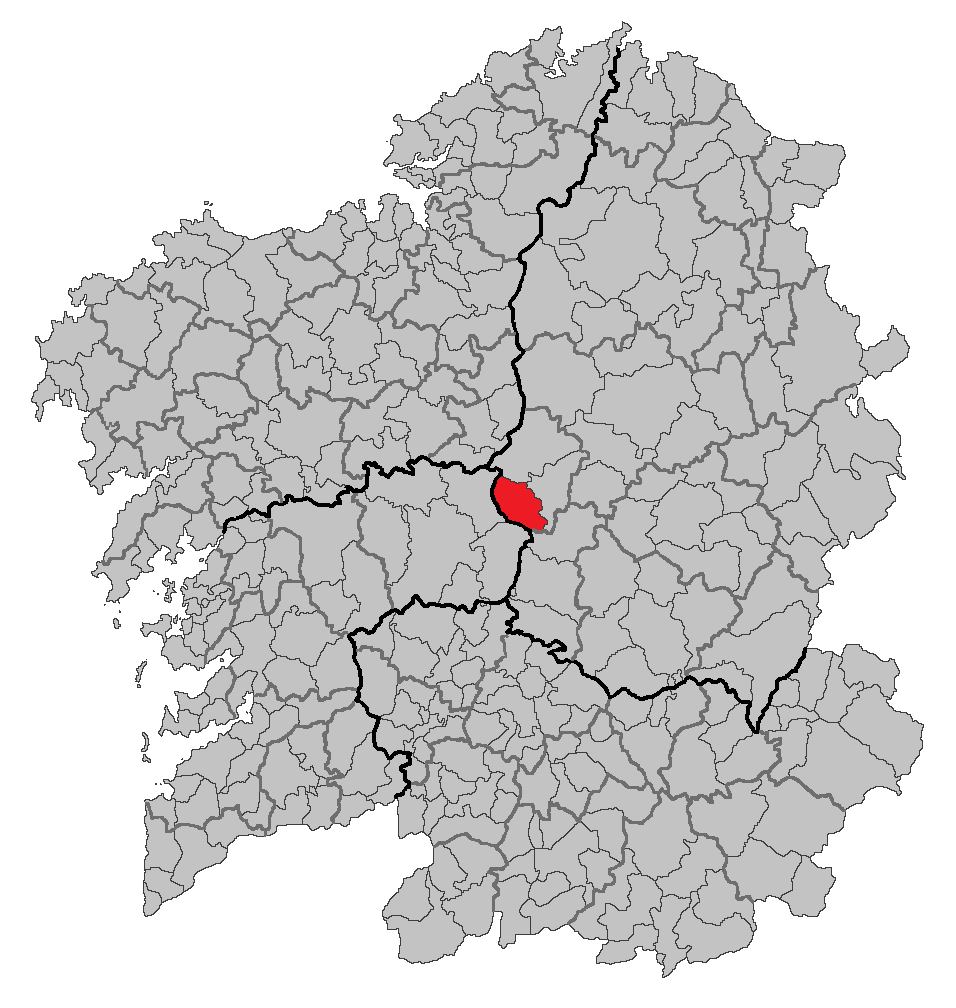 Mapa coa localización do concello de Antas de Ulla.